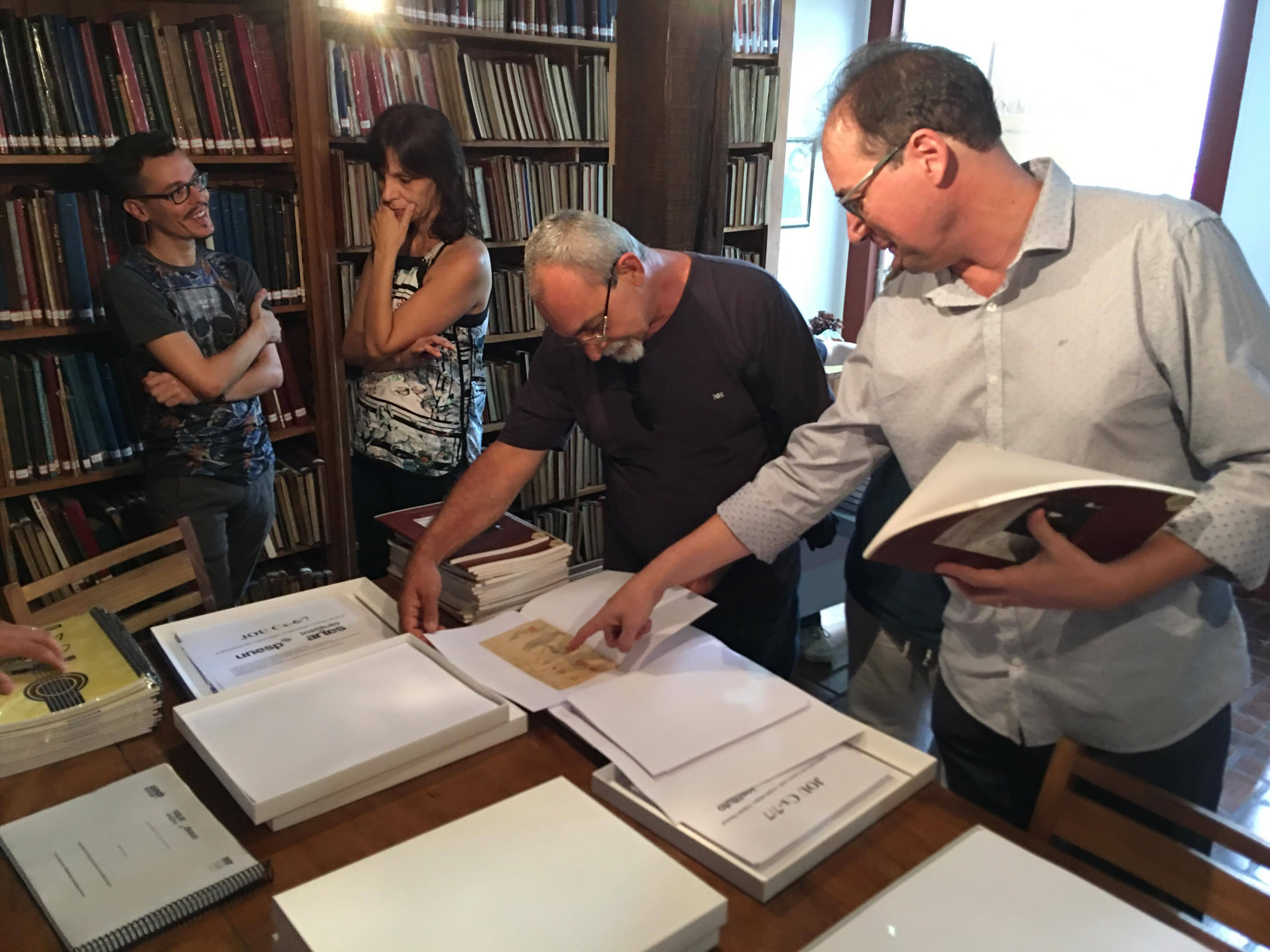 Evento de entrega da Coleção Jouteux (1844-1956) à F-CEREM à Fundação Centro de Referência Musicológica José Maria Neves